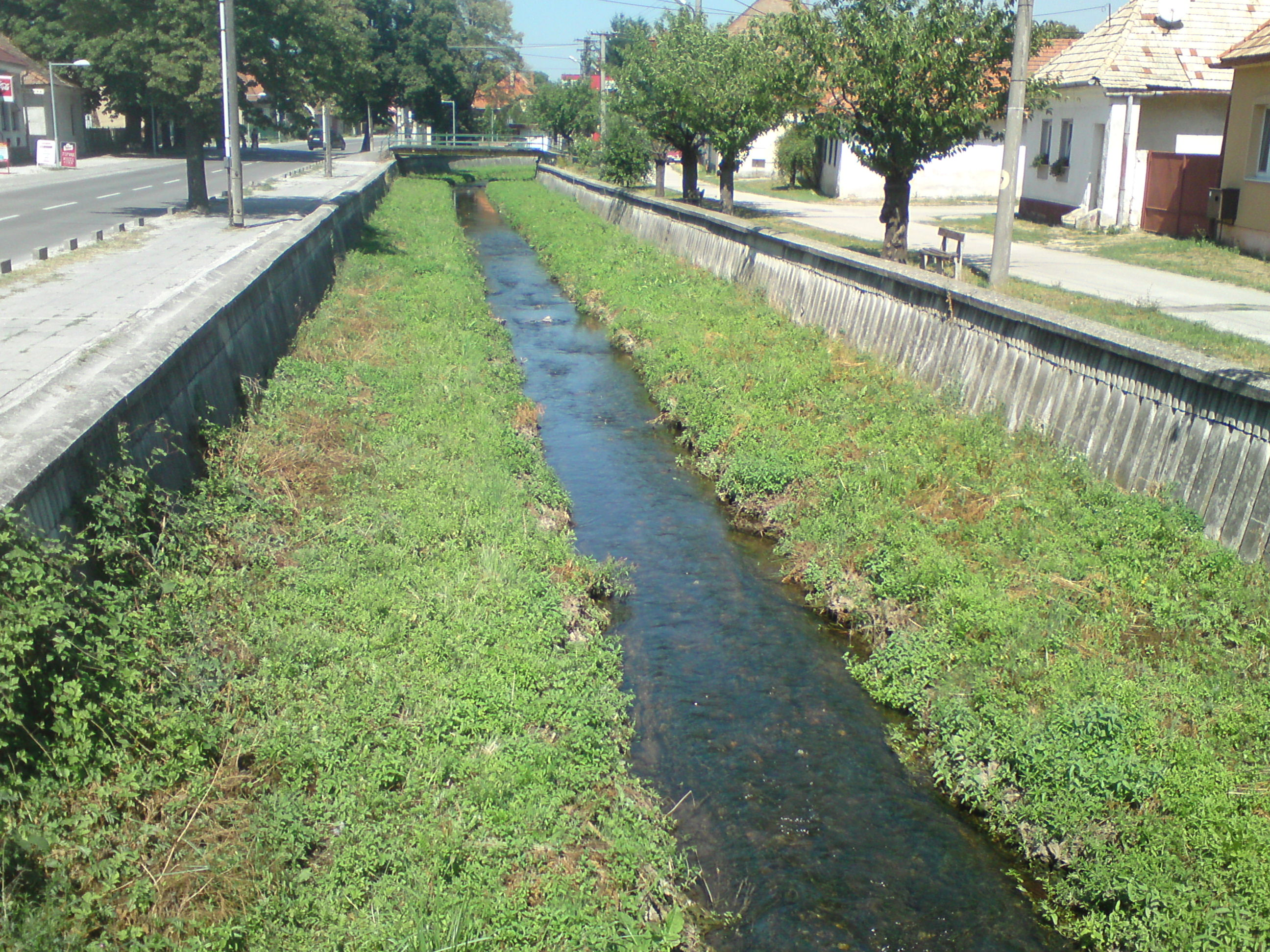 Drahožica vo V. Uherciach